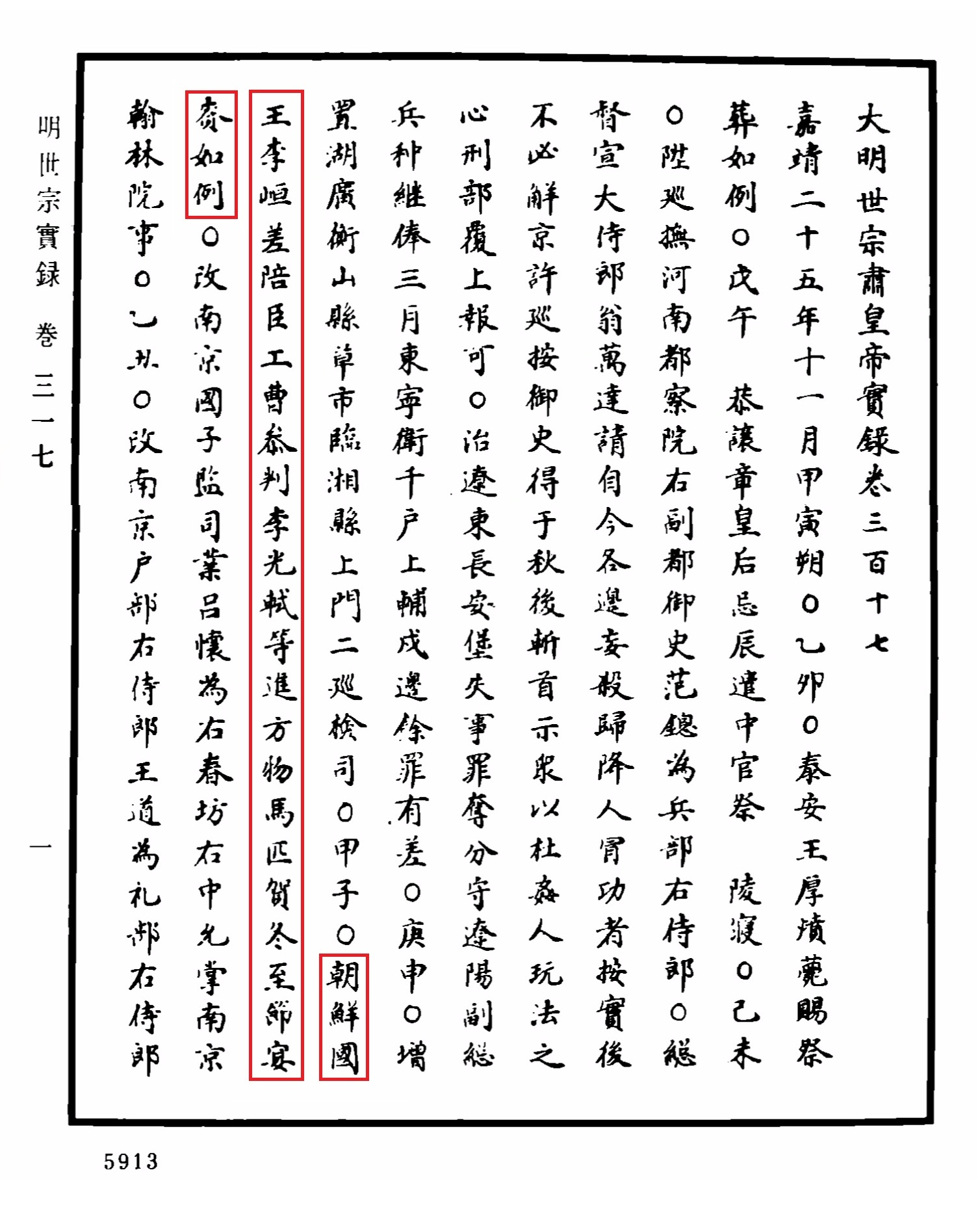 명세종실록 370권, 가정25년 11월 11일자, 5913페이지